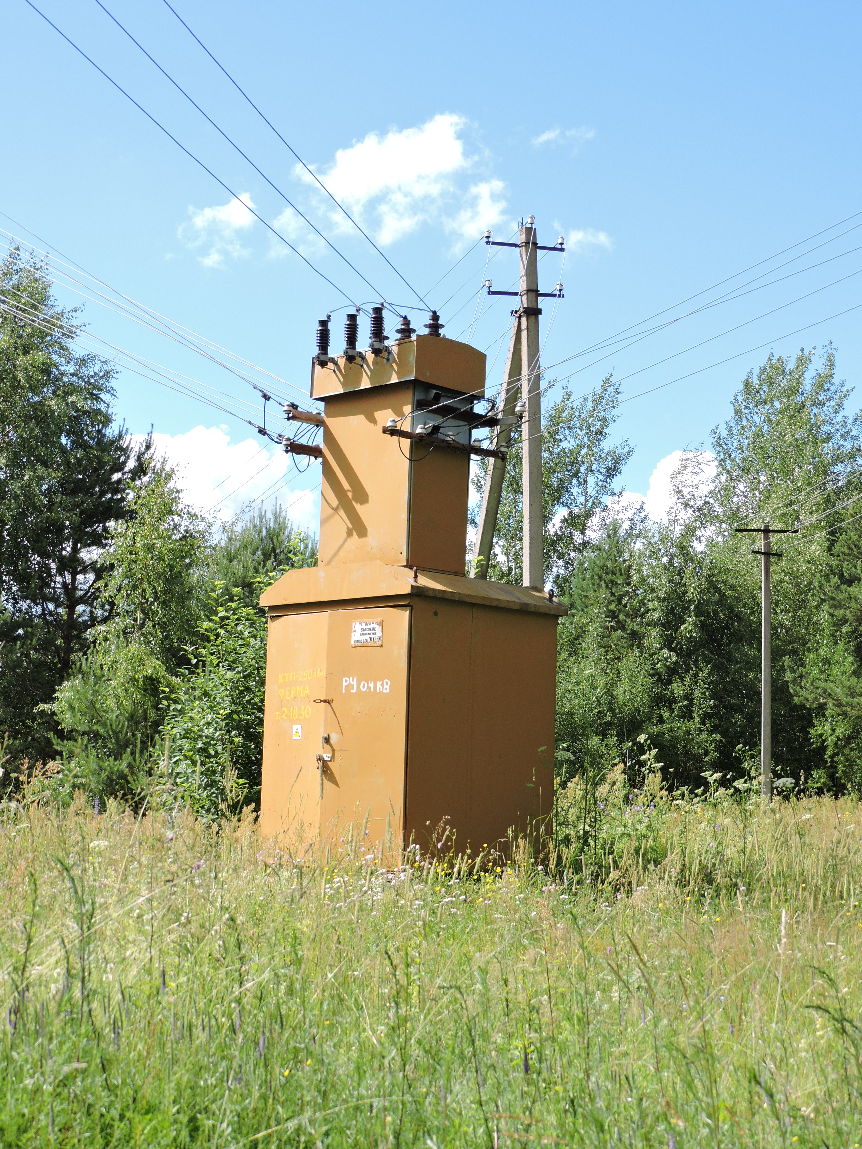 Комплектная электроподстанция